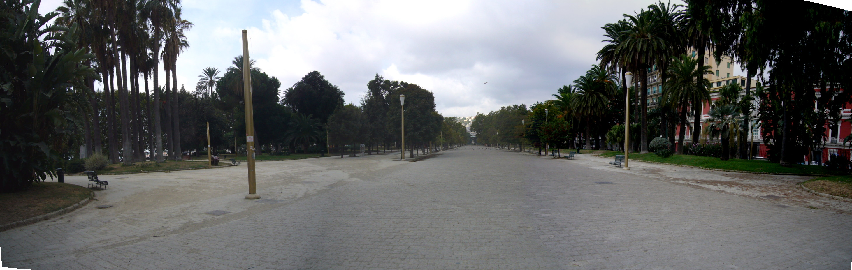 Napoli, Villa Comunale. Vialone principale fra Piazza Vittoria e la Cassa Armonica.